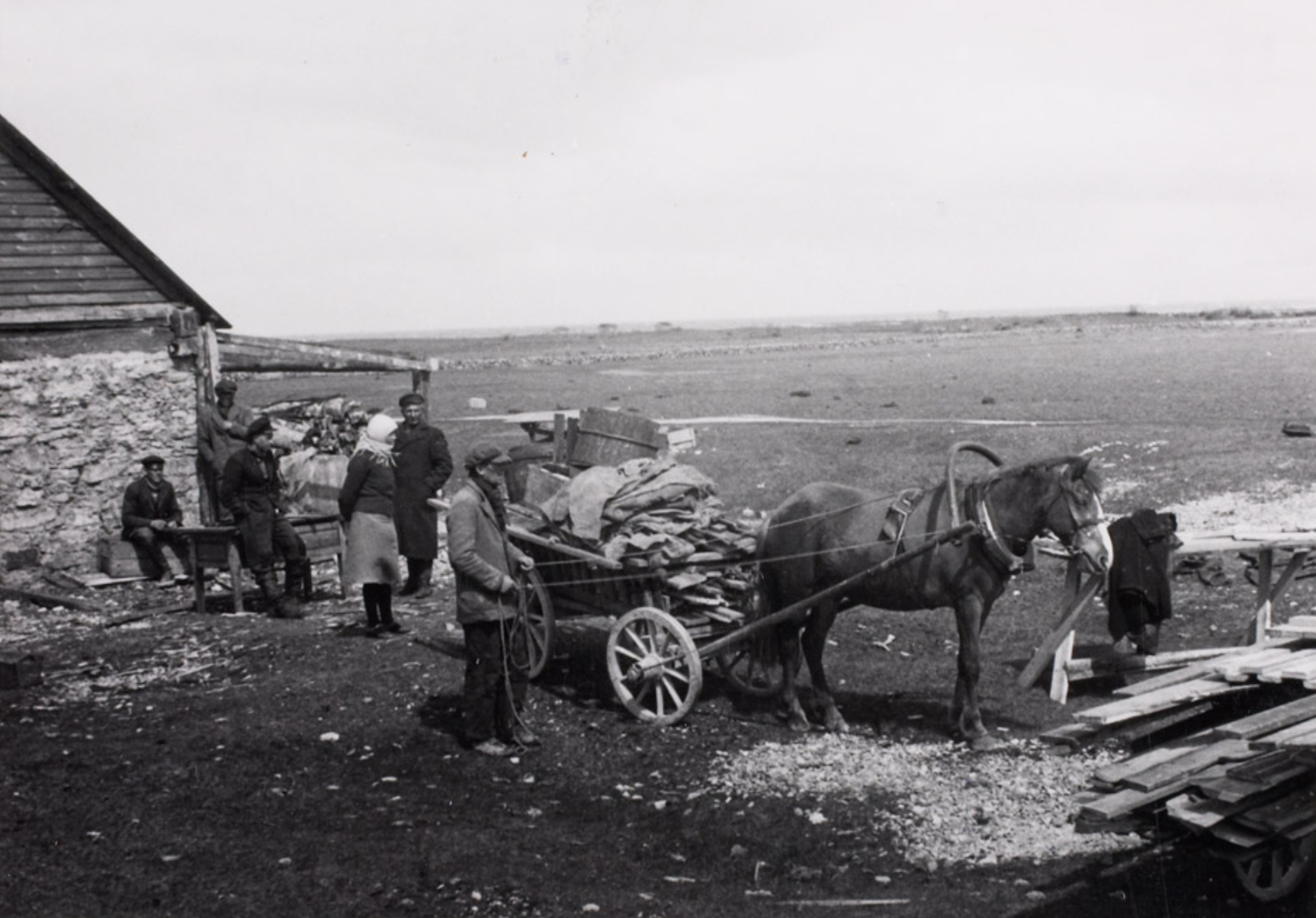 Sundevakueerumine Osmussaarelt 1940. aastal